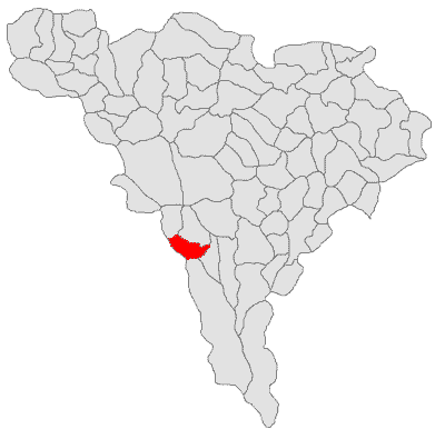 Categorie:Hărţi ale judeţului Alba